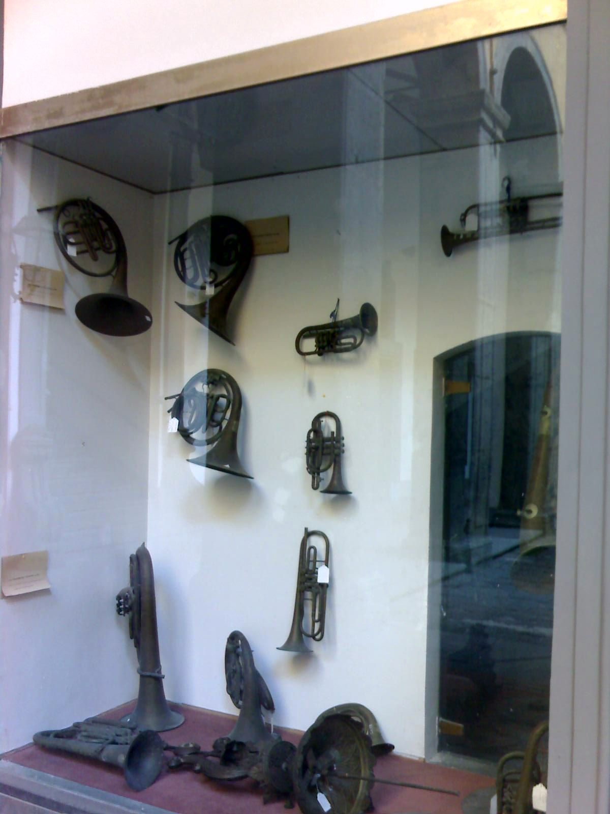 Alcuni strumenti del conservatorio di San Pietro a Majella (Napoli)